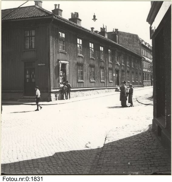 Östra Skansgatan 16, 1924, Bildsamlingen vid Göteborgs stadsmuseum. Foto ur Erik Almqvists samling.